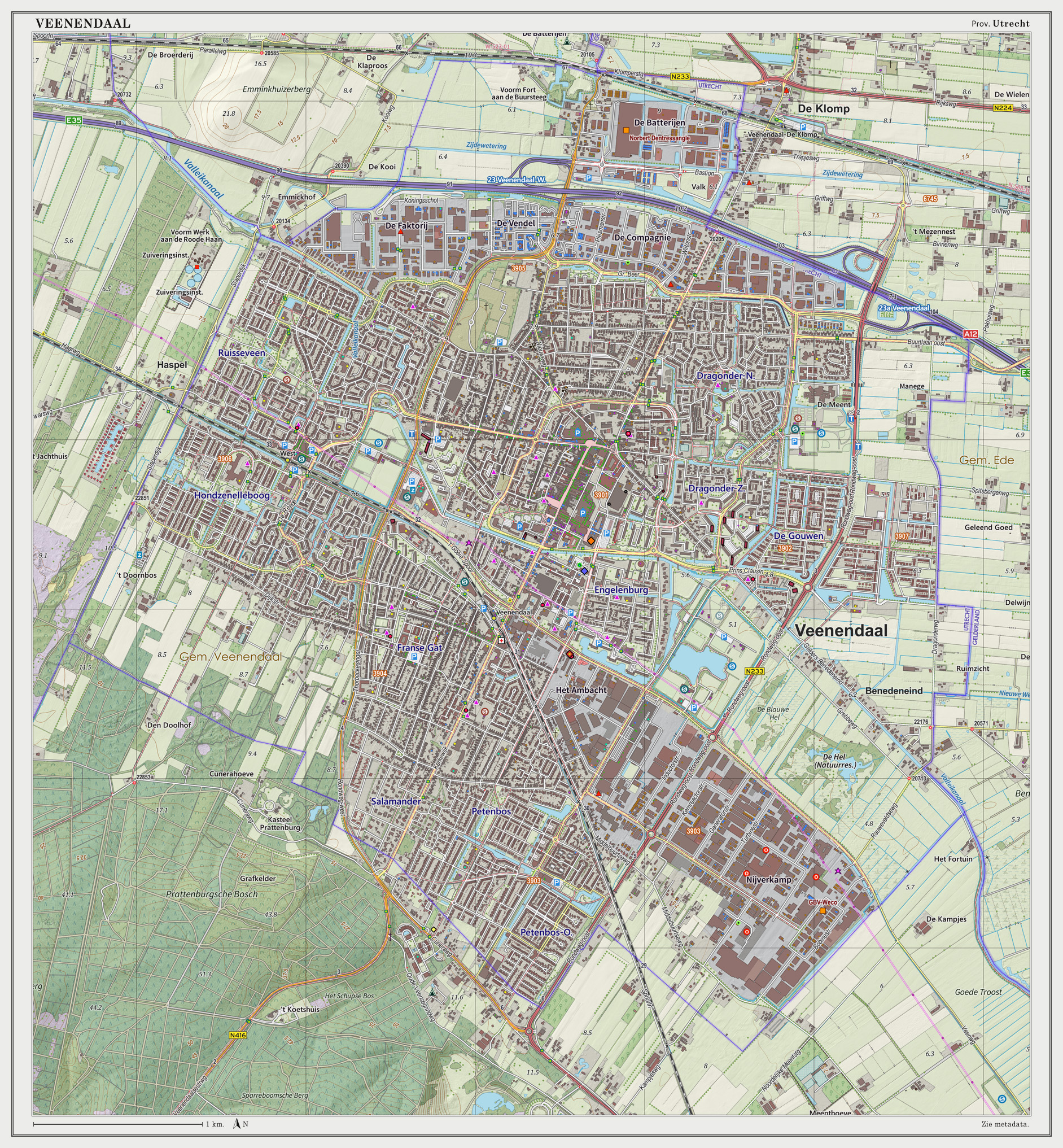 Topografische kaart van Veenendaal (woonplaats). Resolutie: 300 pixels/km. Kaartbeeld samengesteld uit de open geodata van de Top10NL en Top25namen (Basisregistratie Topografie, Kadaster), Creative Commons BY licentie. Gebouwvlakken uit open geodata BAG extract. Wegen uit de OpenStreetMap. Reliëfschaduw uit de Actuele Hoogtekaart AHN2. Samenstelling en kleurenschema: Jan-Willem van Aalst, met QGIS2. Zie ook de Legenda.